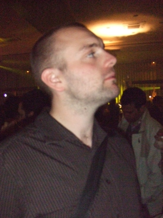 人的下巴侧面图.